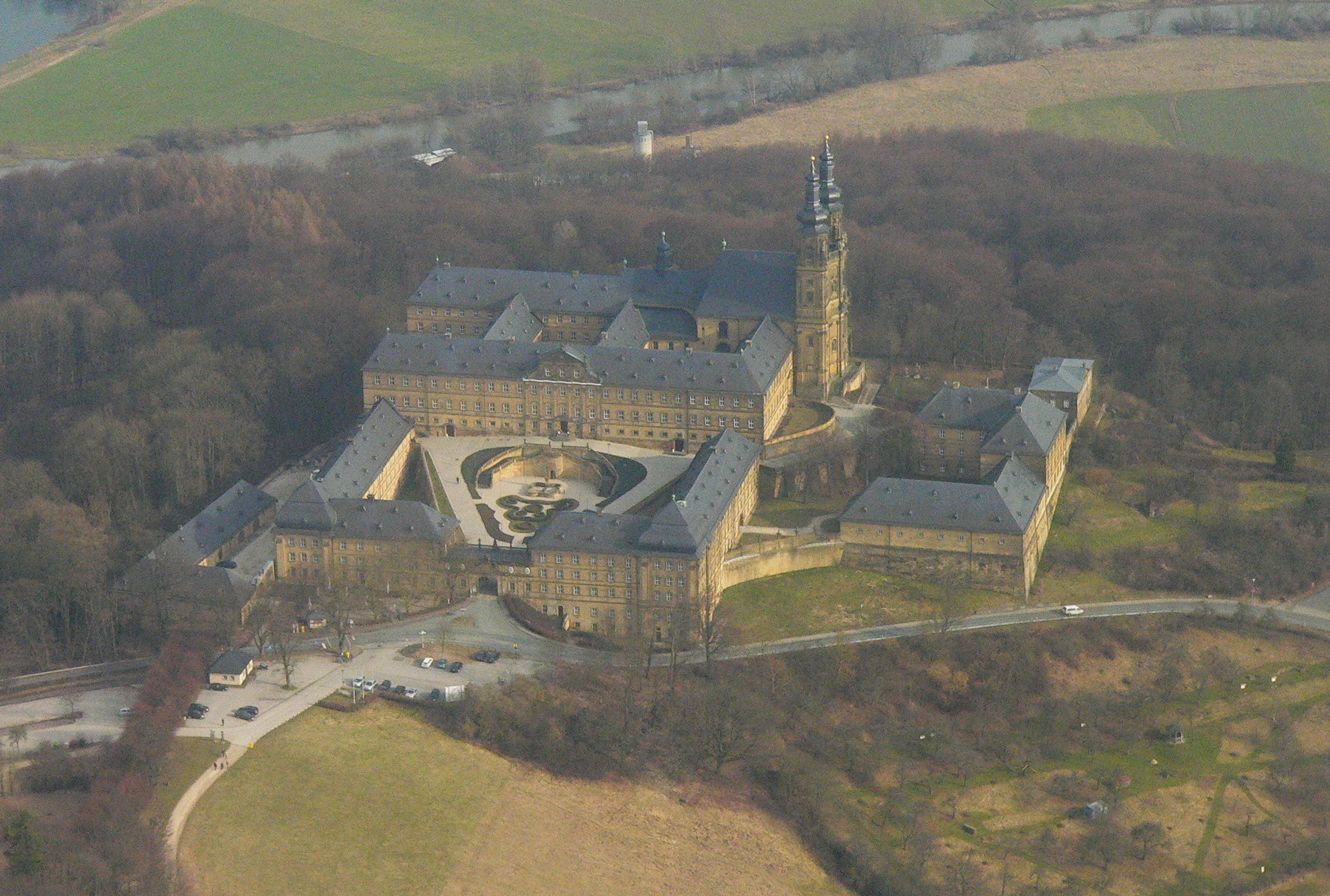 Kloster Banz bei Staffelstein, Oberes Maintal, Bayern